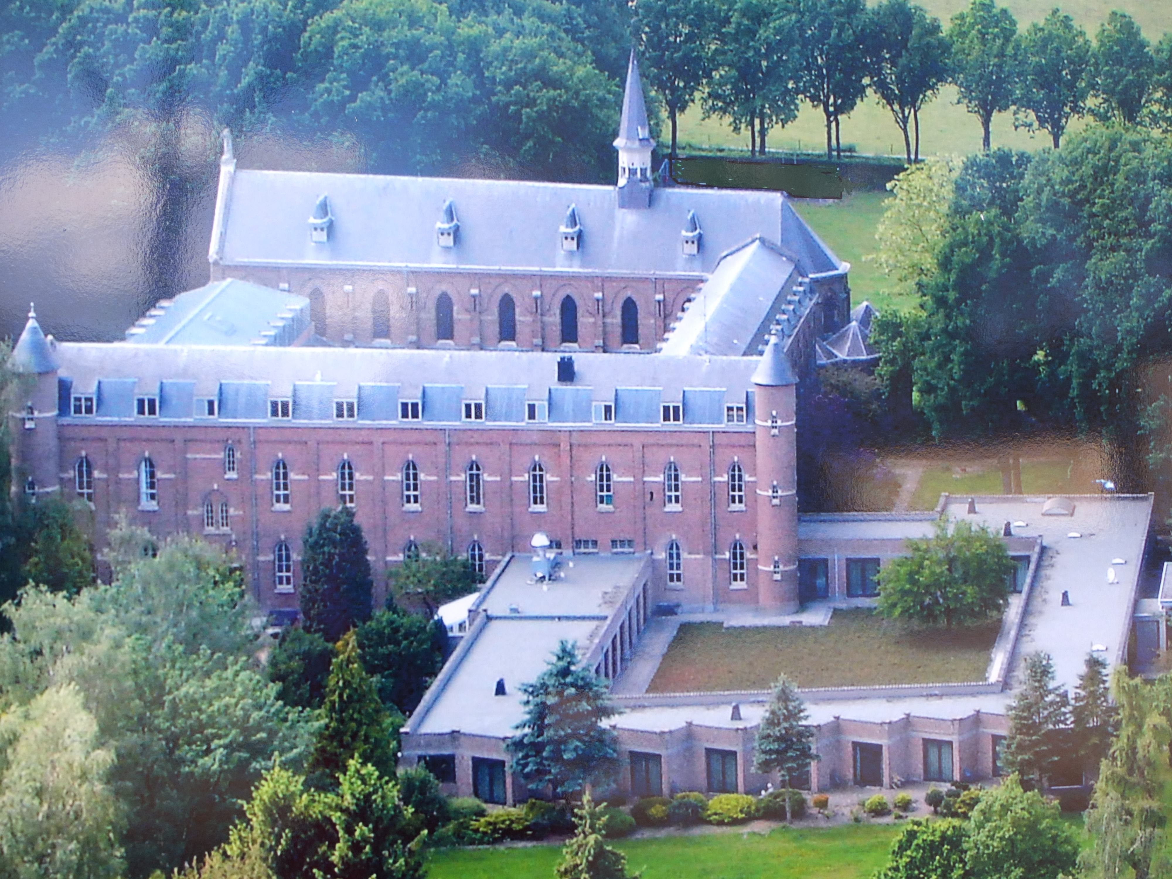 Informatiebord van de Abdij Maria Toevlucht